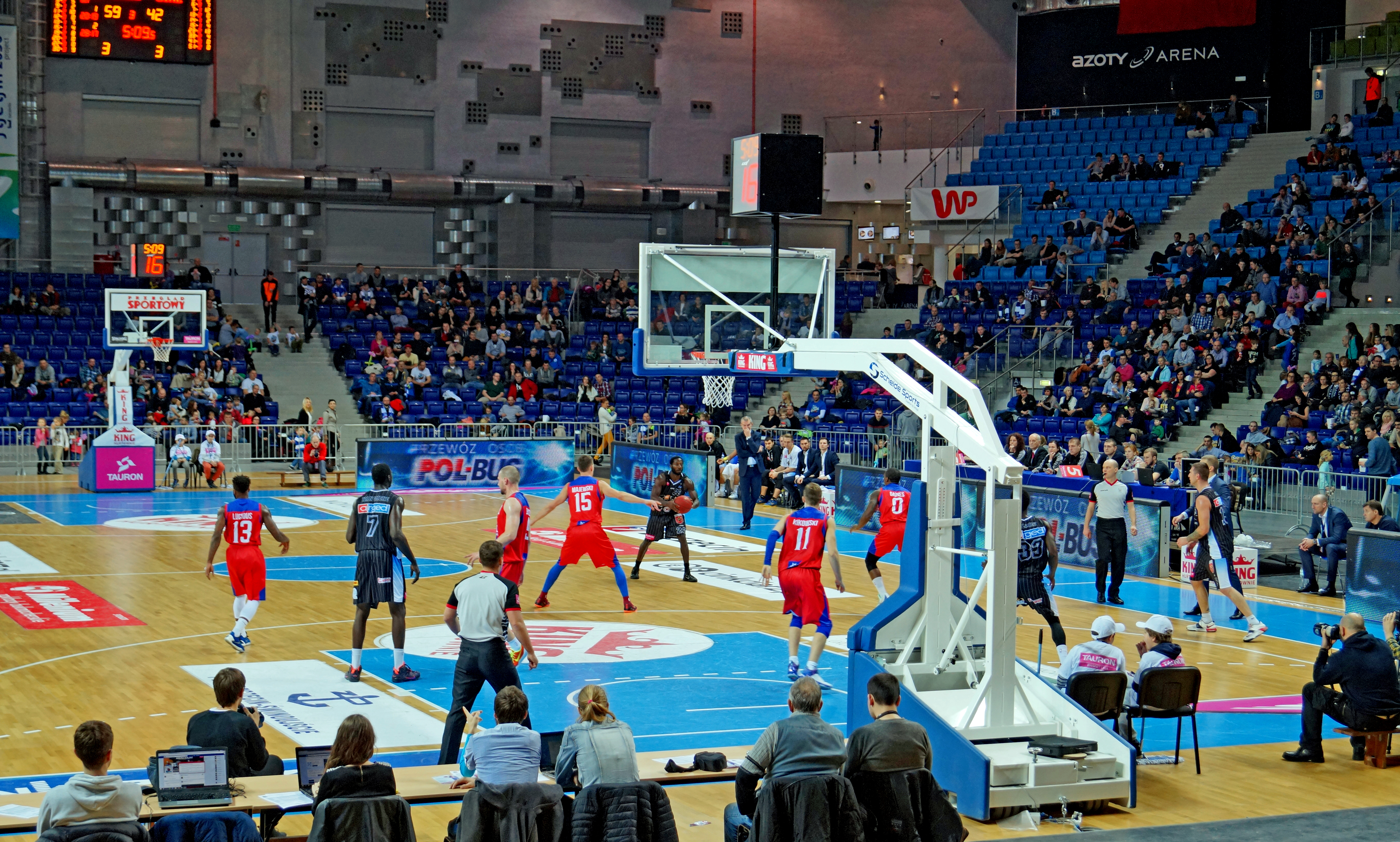 9 kolejka, sezonu 2015/16, mecz King Wilki Morskie Szczecin vs BM Slam Stal Ostrów Wielkopolski, Arena Szczecin (Arena Azoty) w Szczecine, Polska